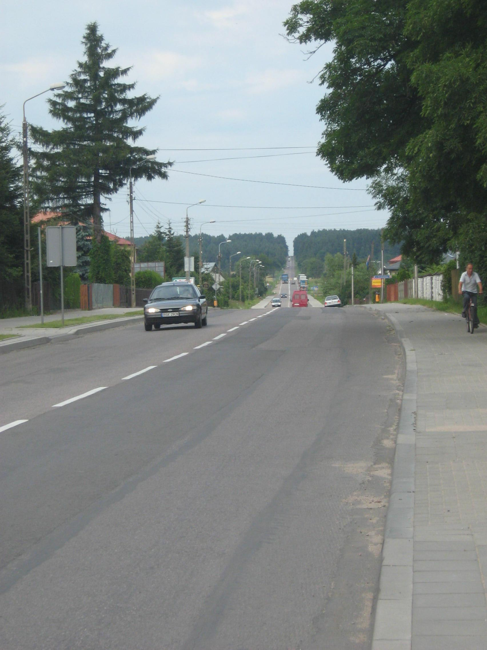 Droga krajowa nr 19 w Sokółce.